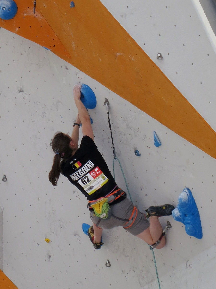 Anak Verhoeven en demi-finale du championnat d'Europe d'escalade (difficulté) 2013 à Chamonix